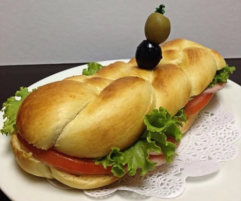 El lápiz es el sándwich más importante de la cocina costarricense, elaborado jamón y/o carne de cualquier tipo especialmente de pollo, queso, tomate, lechuga, frijoles molidos, aguacate, salsa de tomate, mayonesa, mostaza, salsa Lizano, sal, pimienta y aceite de oliva